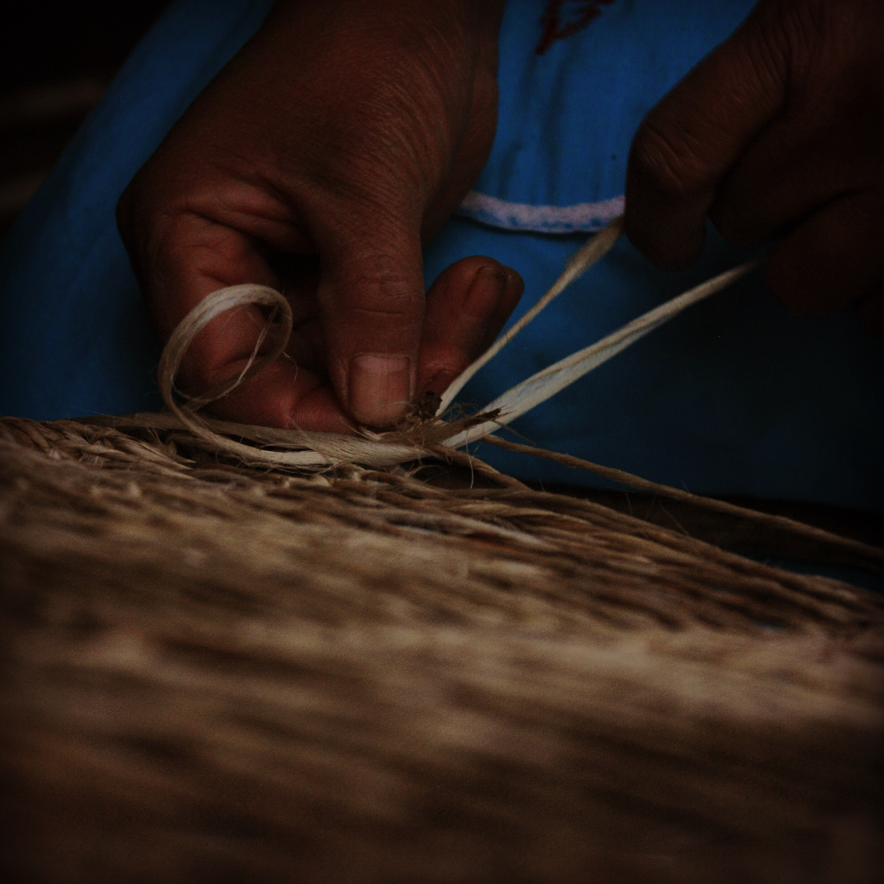 Detalle de artesana tejiendo una pieza de madera con jonote en Puebla